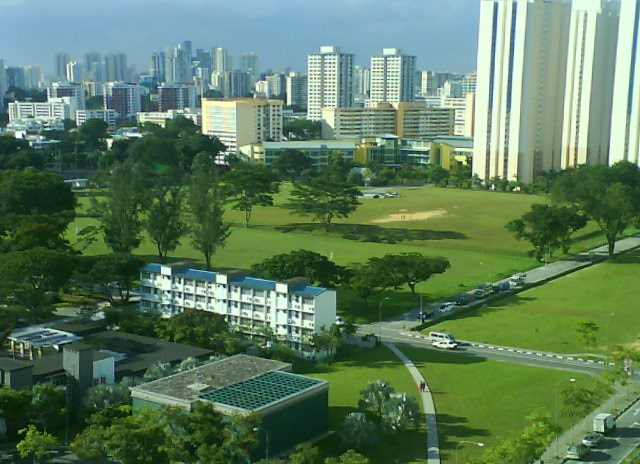 Farrer park field